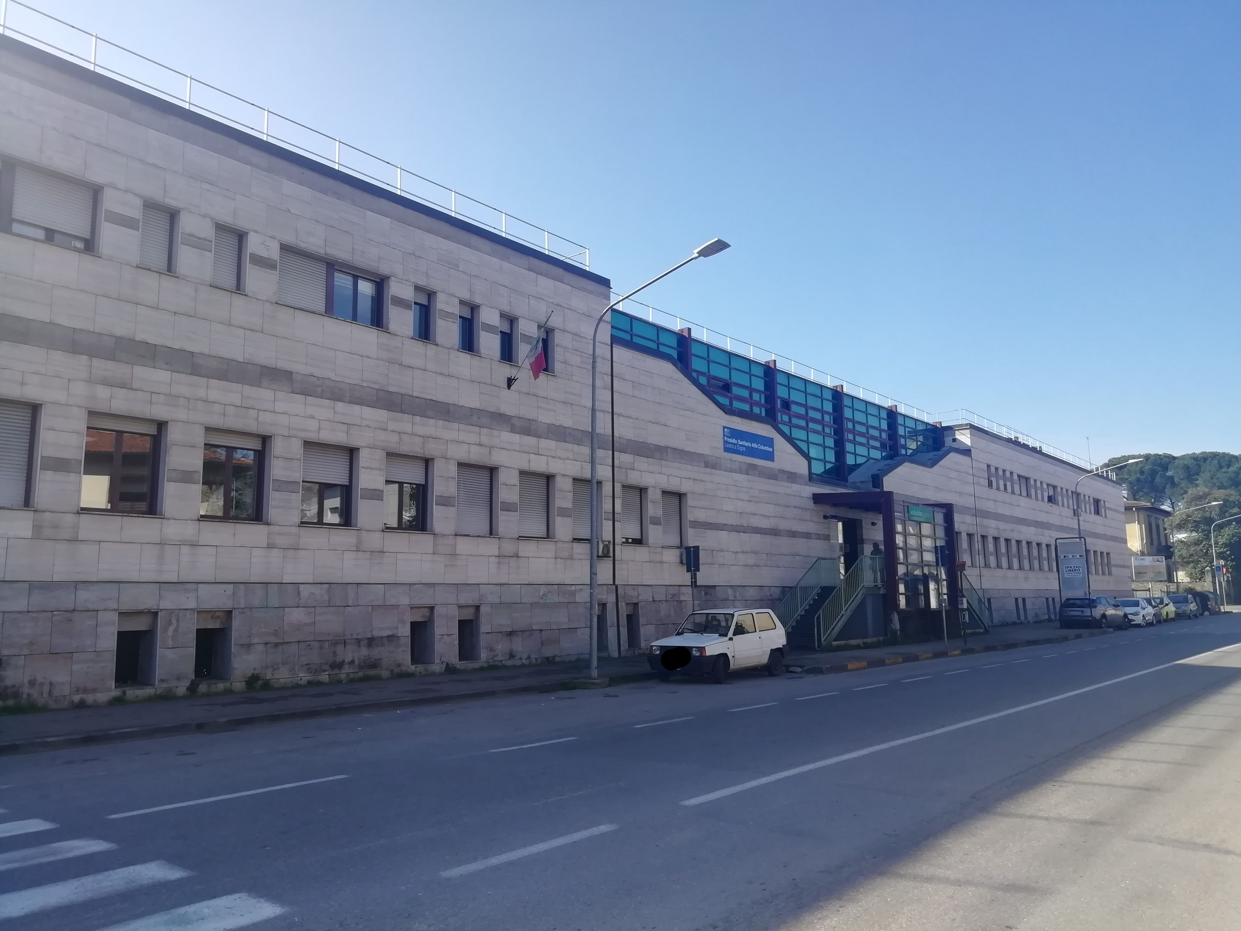 Facciata principale dopo la ristrutturazione di Alfonso Stocchetti completata nel 2002